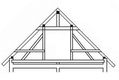 Jednoduché schéma stojaté stolice (krovu)